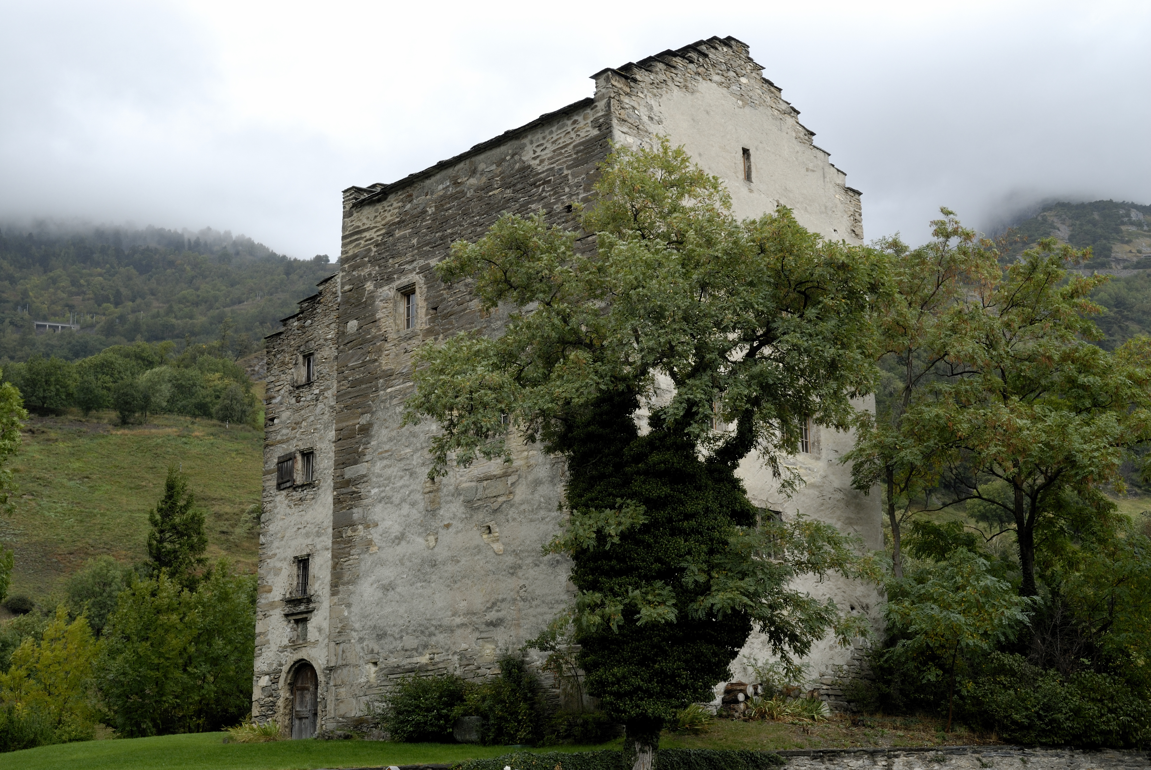 Wohnturm der Viztume